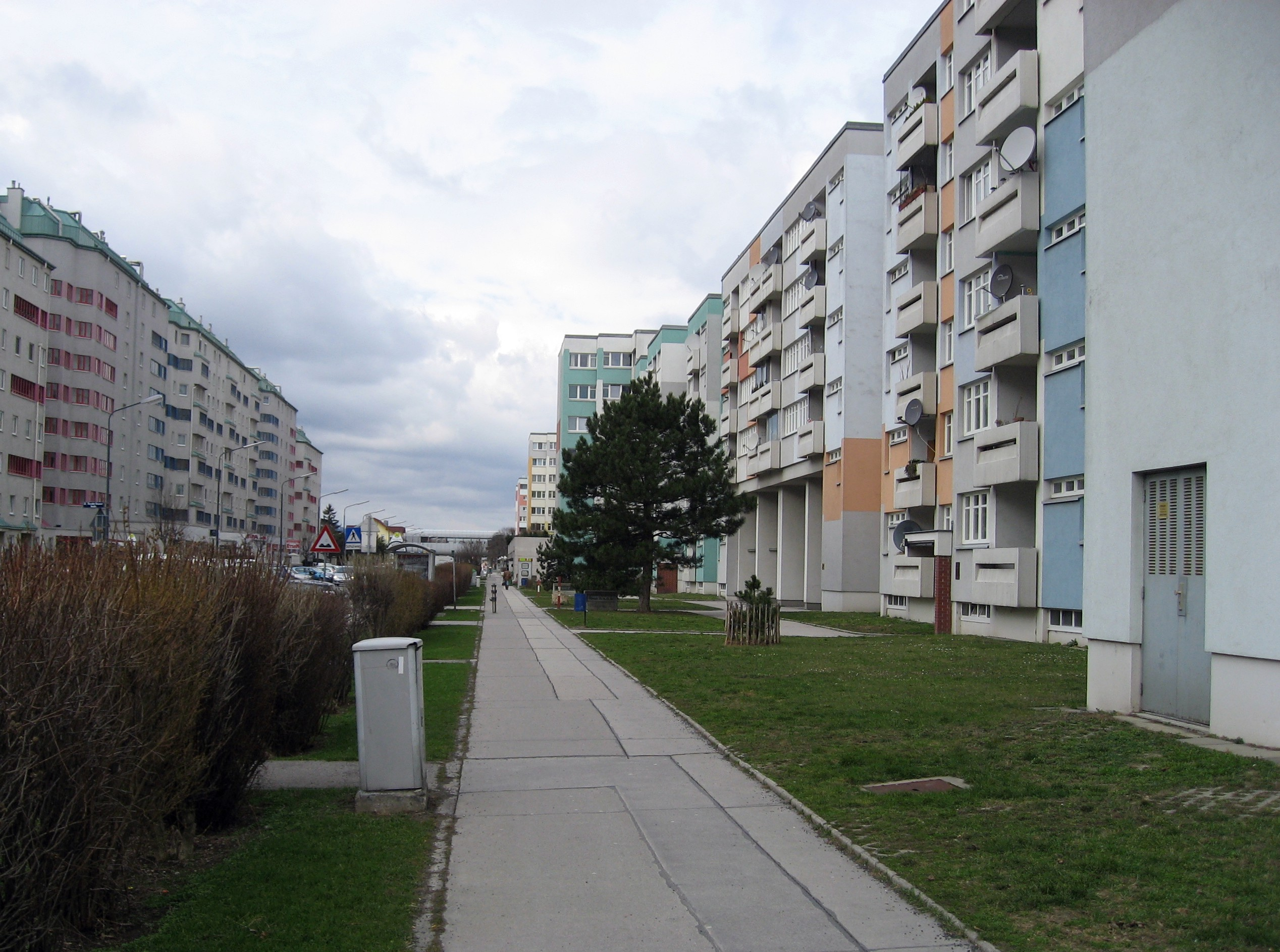 Wien, Trabrenngründe